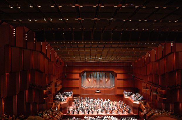 Großer Saal der Alten Oper, Frankfurt am Main, Germany